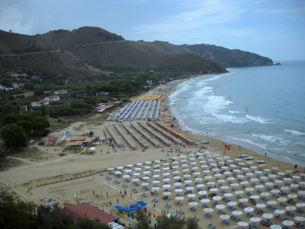 Sperlonga:spiaggia di levante e marina